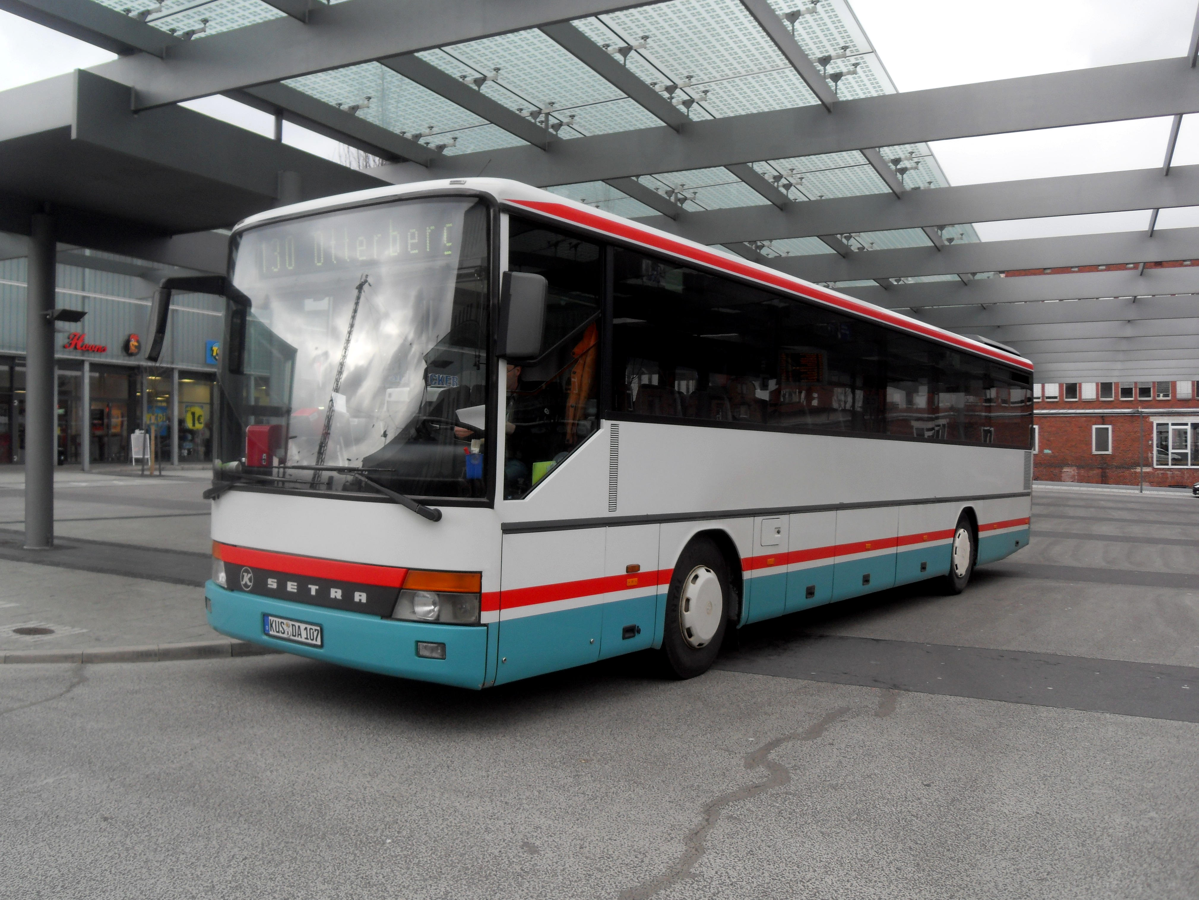 Bus S 315 UL der Marke Setra im Kaiserslauterner Busbahnhof am Kaiserslauterner Hauptbahnhof auf der Linie 130 auf dem Weg nach Otterberg in der Pfalz in Rheinland-Pfalz (Deutschland)